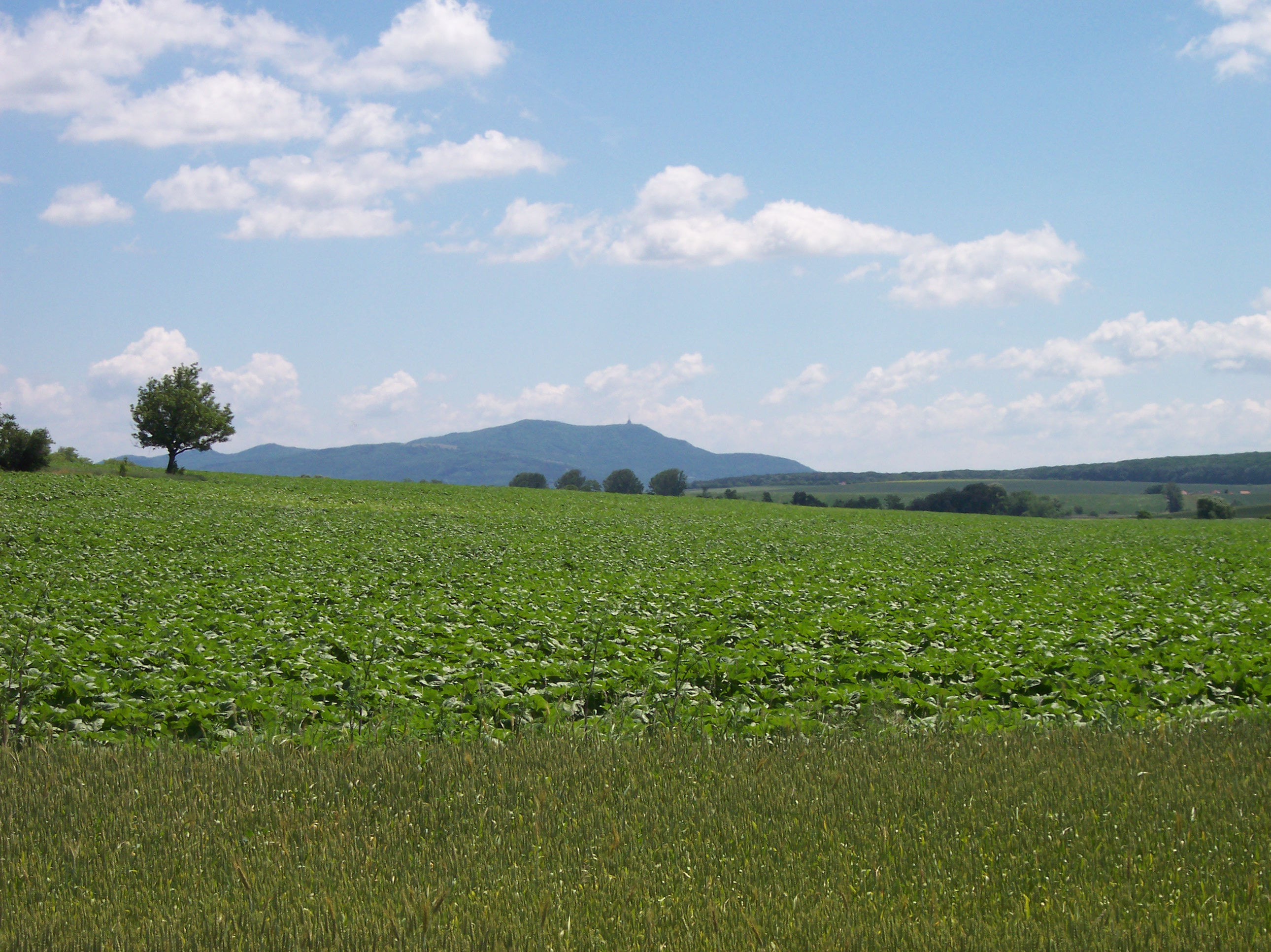 Nitrianska pahorkatina pri Lukáčovciach, v pozadí Tribeč.